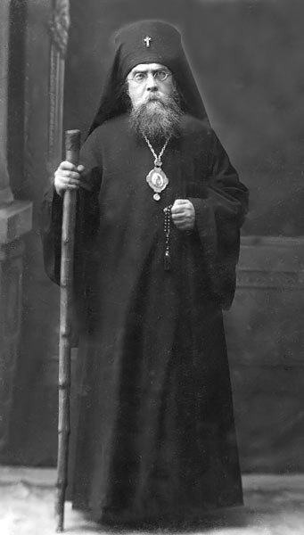 Николай Добронравов, архиепископ Владимирский и Суздальский.